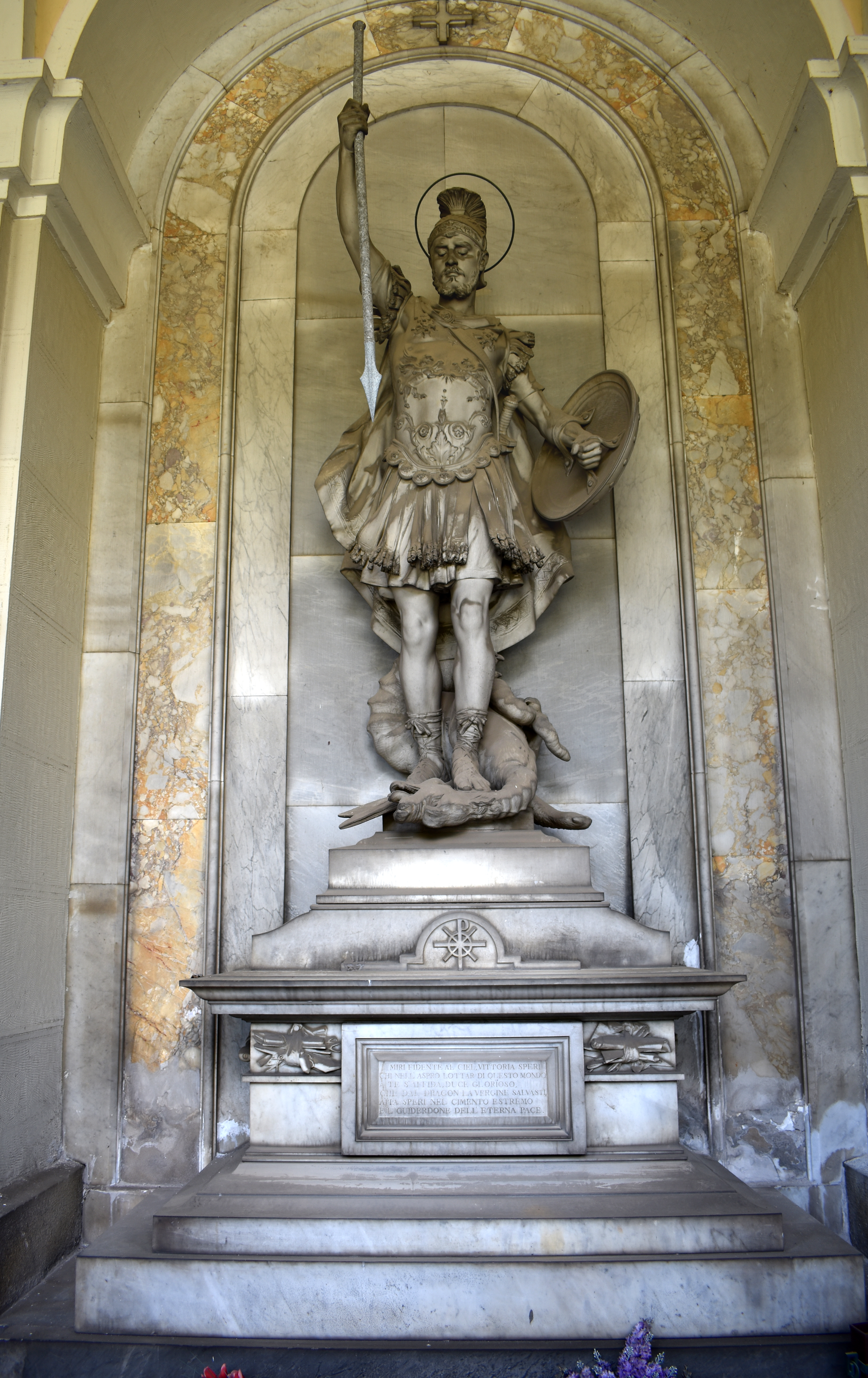 Monumento del cimitero. Tomba Giovanni Scanzi